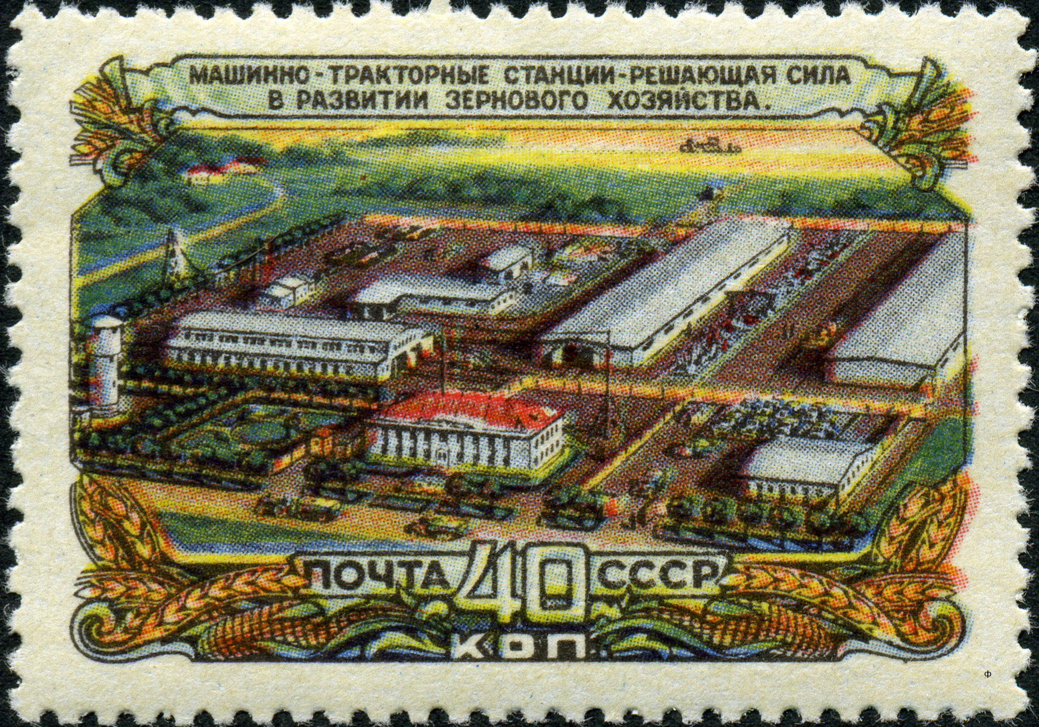 Марка СССР